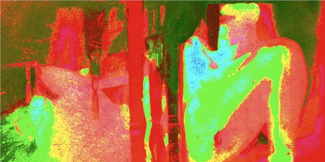 Farbstudie, um 2000